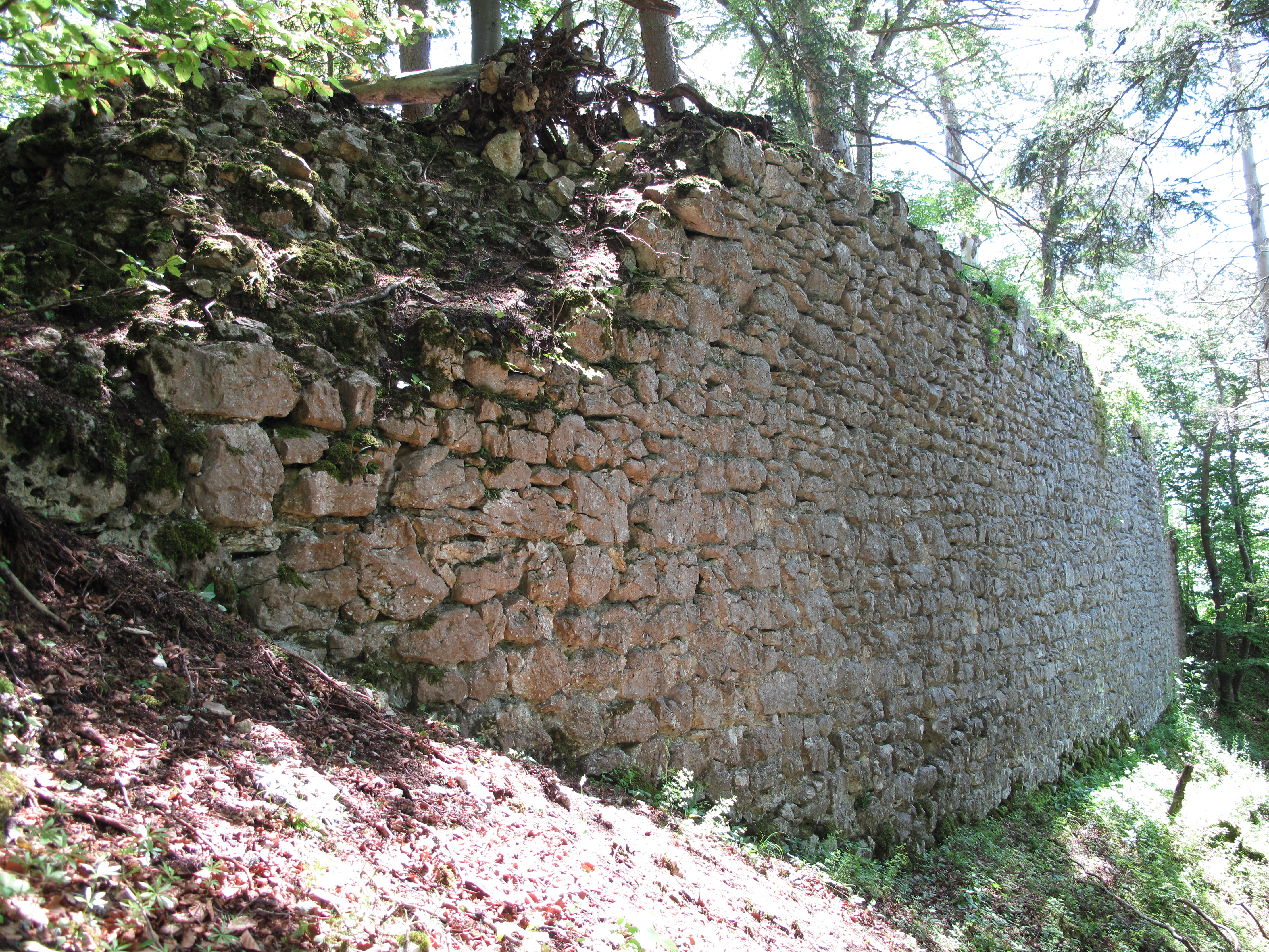 Beeindruckender Rest der westlichen Umfassungsmauer.